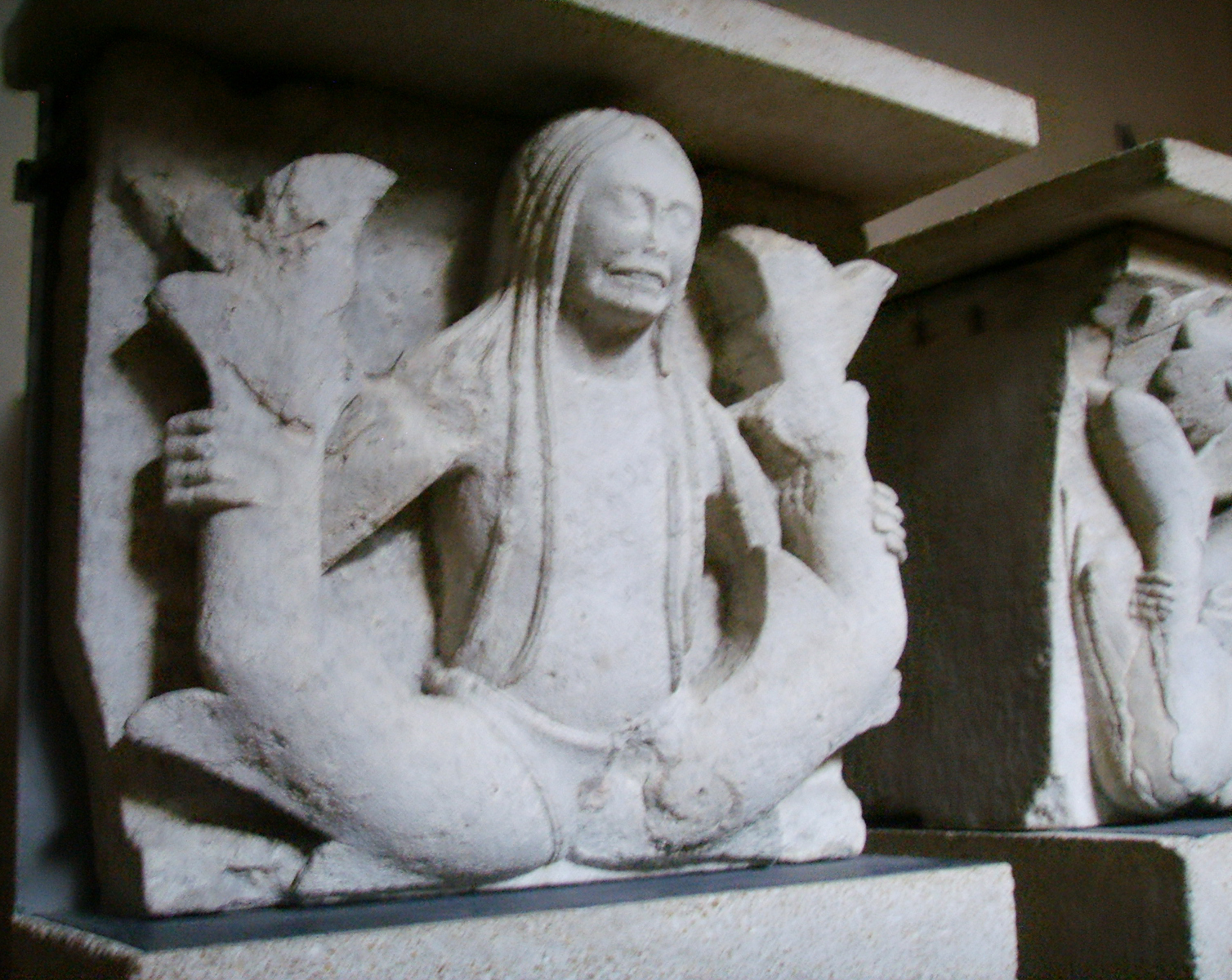 duomo di modena